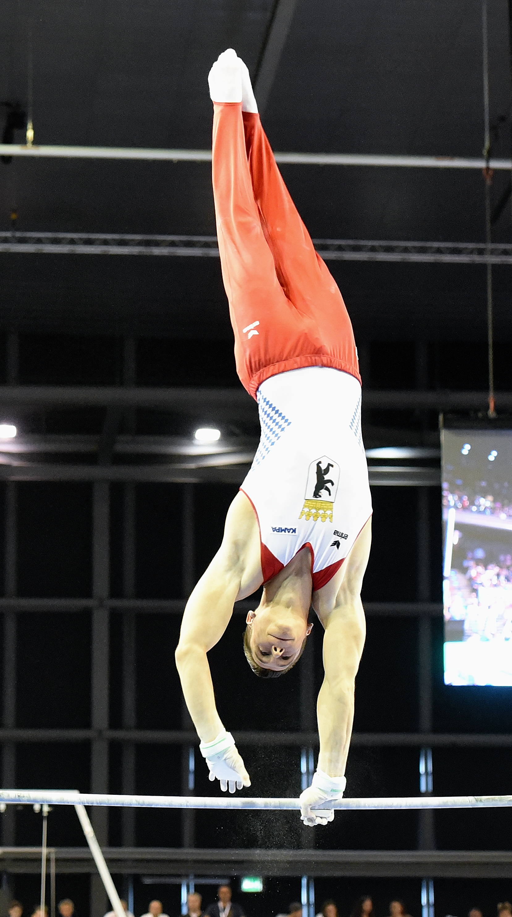 Deutsche Meisterschaften Gerätturnen Mehrkampf männlich Wettkampf beim Internationalen Deutschen Turnfest Berlin 2017. Abgebildet: Lukas Dauser.